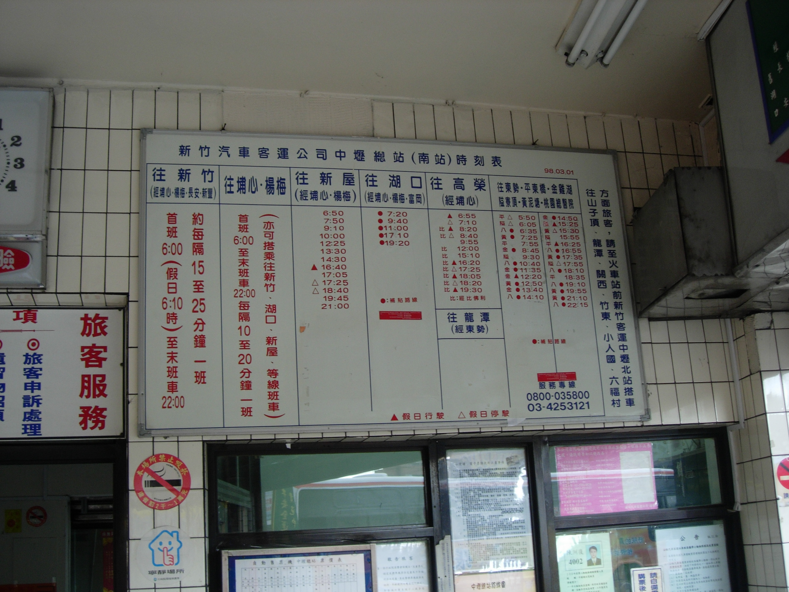 中文（台灣）: 新竹客運中壢南站時刻表